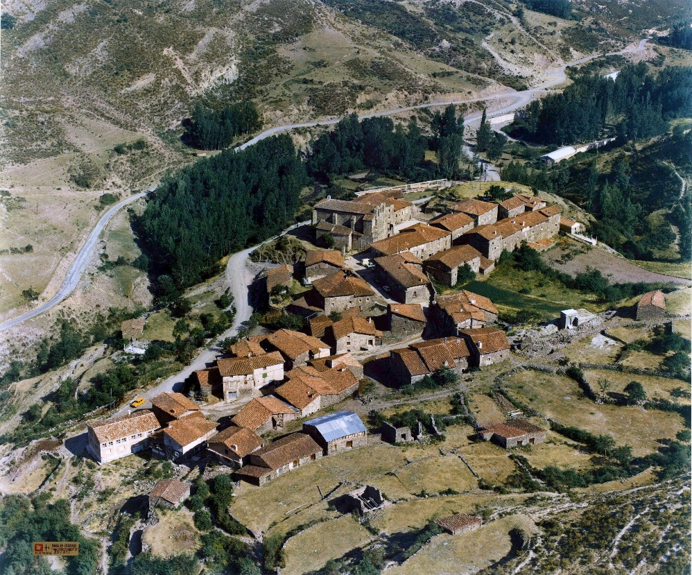 eigene Aufnahme